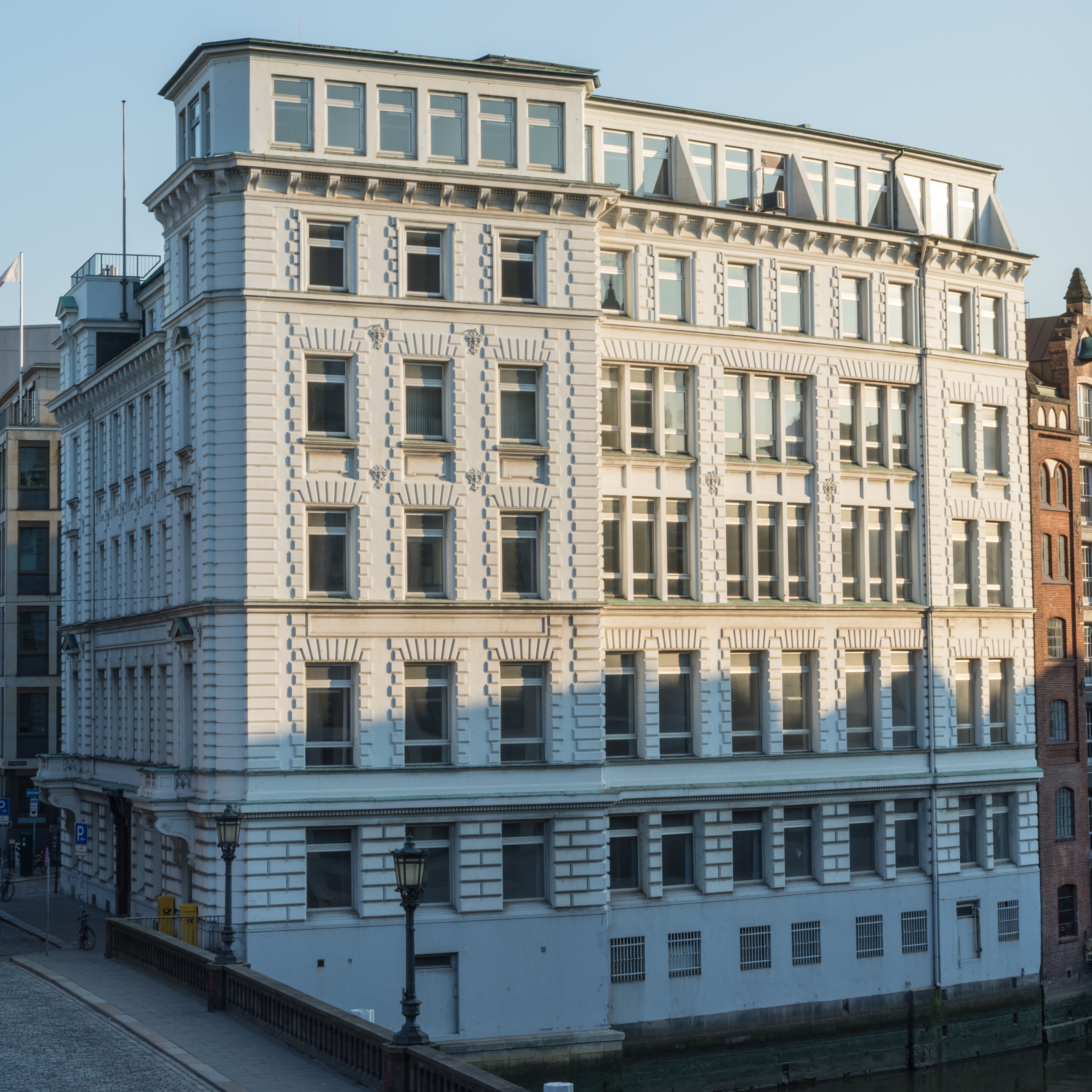 Kontorhaus Cremon 37 in Hamburg-Altstadt. This is a photograph of an architectural monument.